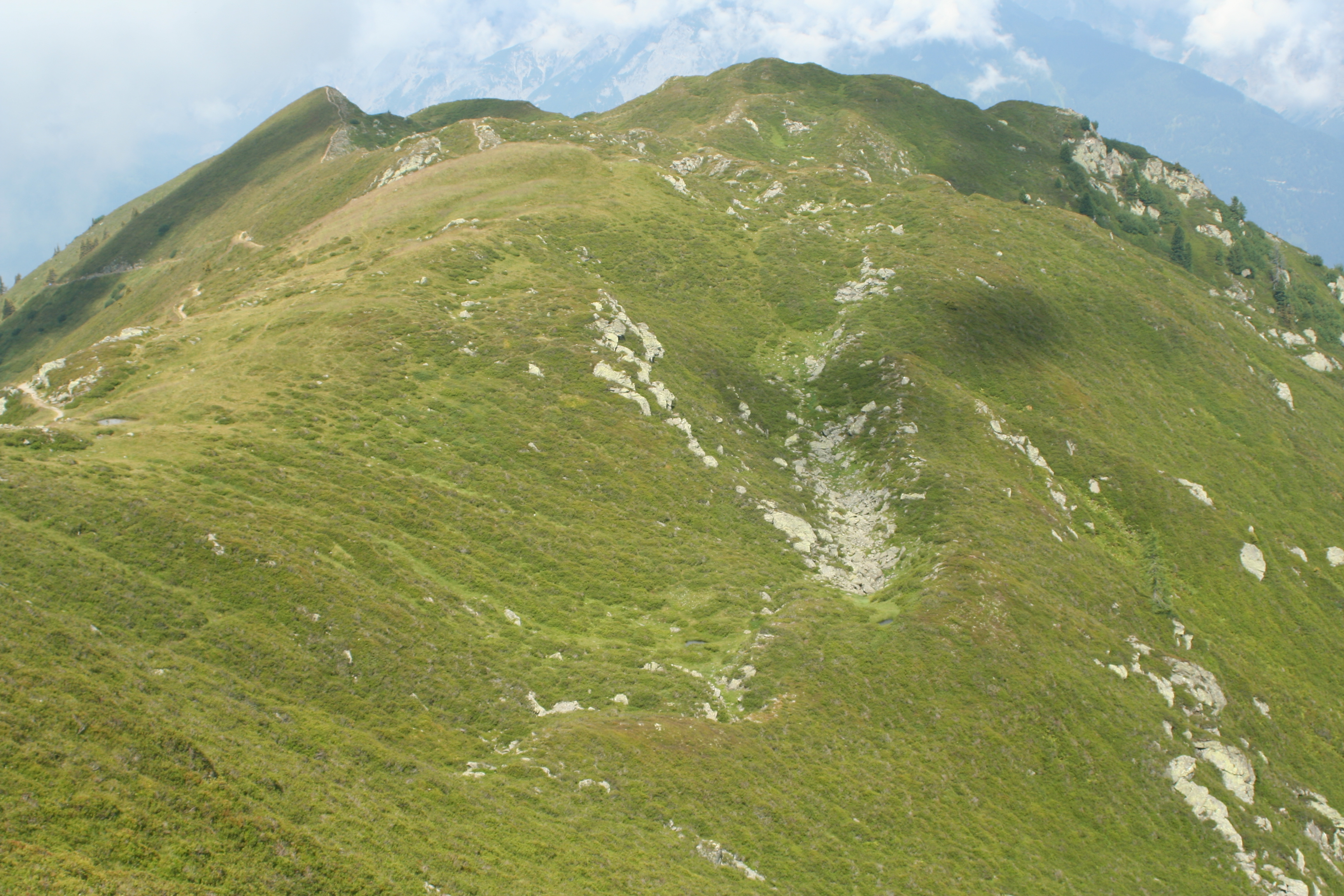 Nackental am Kellerjoch als Zeichen einer Sackung des Hanges bzw. Bergzerreißung